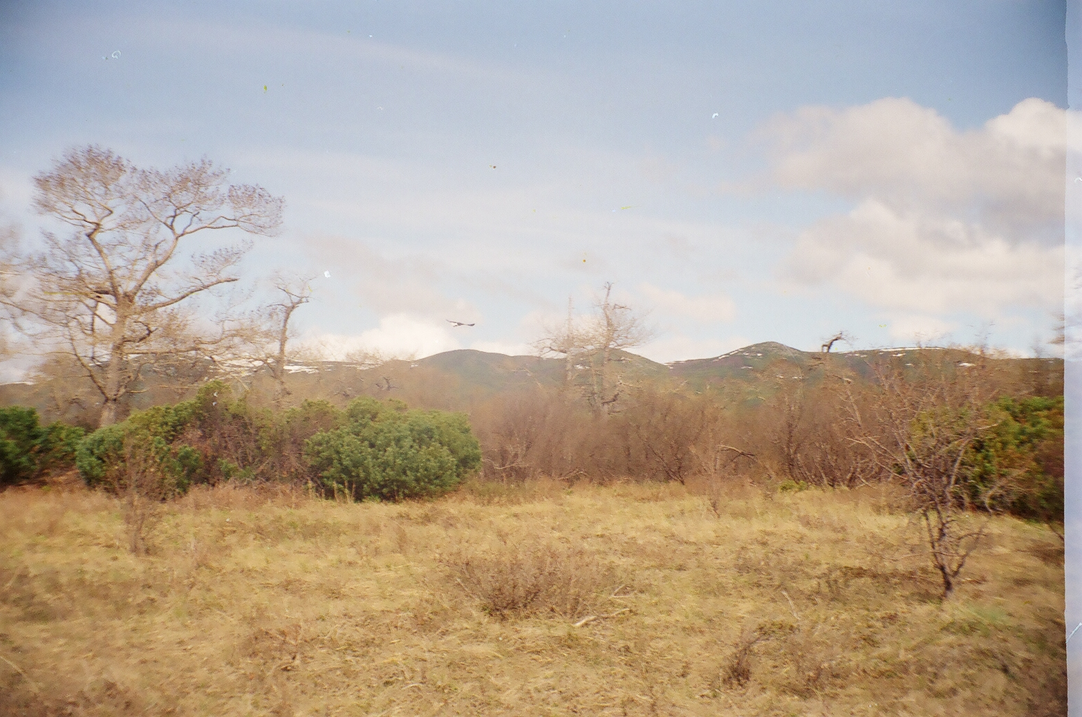 Таватумский (Таватумский термальный источник): Юго-западная часть территории Северо-Эвенского района в долине р.Таватум, впадающей в Гижигинскую губу залива Шелехова Охотского моря, в 2 км к СВ от п. Таватум Широта: 61.78370 Долгота: 157.41247,Северо-Эвенский район, Магаданская область This image is related to the protected area of Russia number 4910036